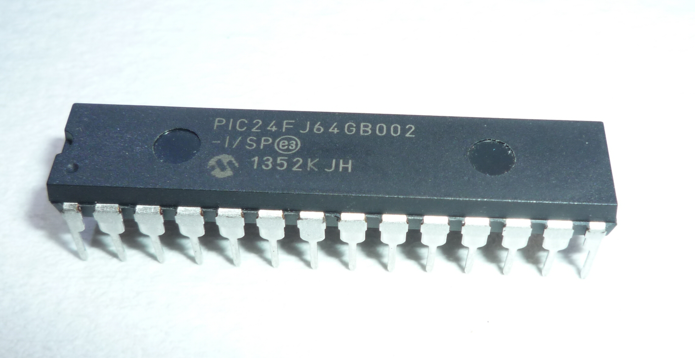 Pic24fj64gb002-isp